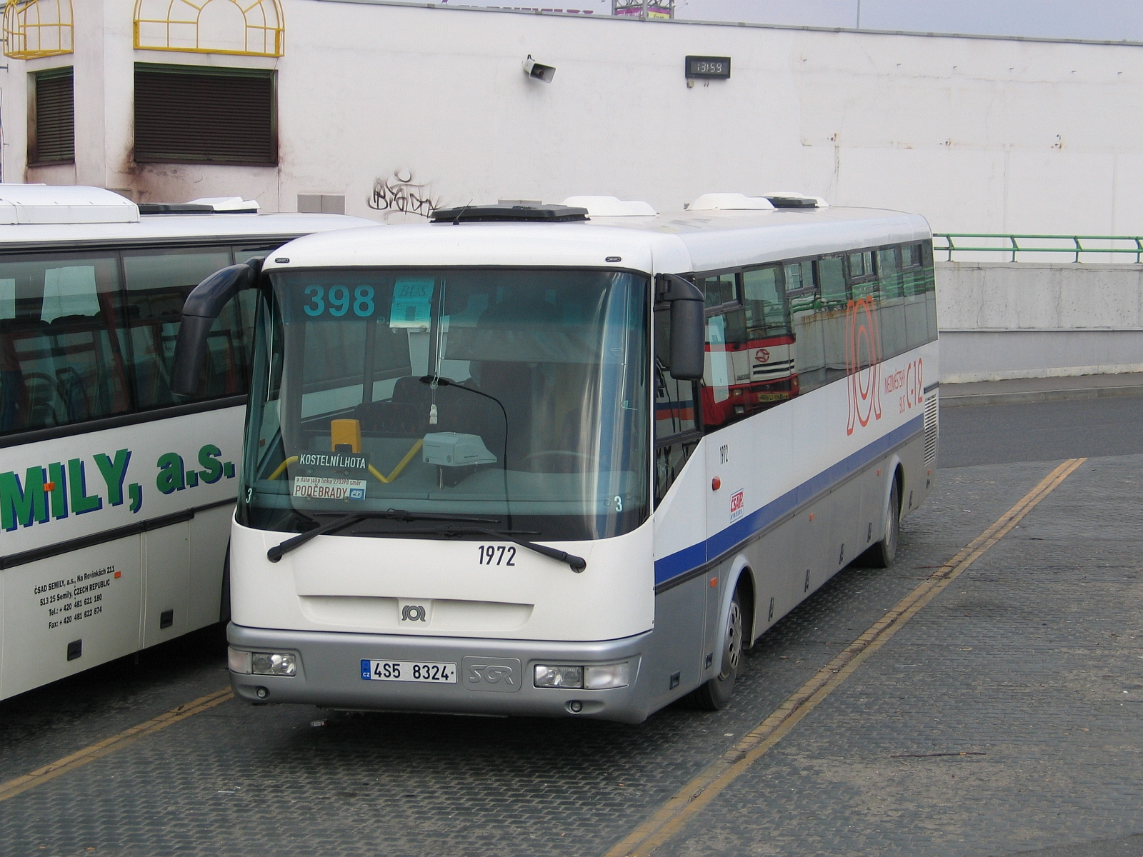 SOR C 12, Praha. Autobus ČSAP Nymburk na lince 398 v terminálu Praha, Černý Most.